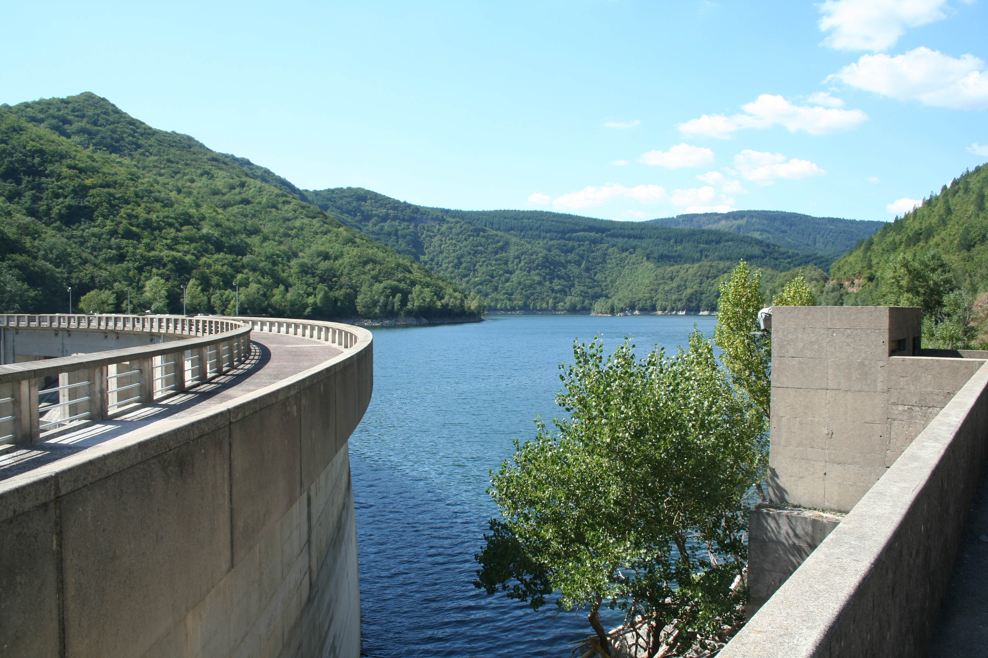 Avène (Hérault) - barrage sur l'Orb et lac de retenue.